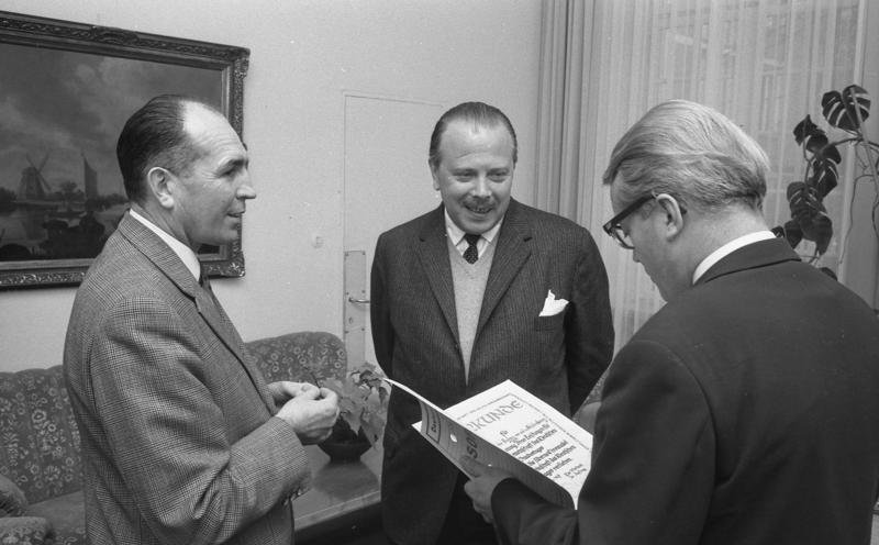 Regierungsdirektor Bücker und Herr Schulmeister verleihen Freiherrn von Guttenberg das Silberne Sportabzeichen